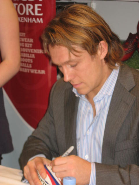 Jonny Wilkinson en représentation avec le XV de la Rose. Prise le 4 décembre 2008. Jonny Wilkinson with English team. 4 December 2009.